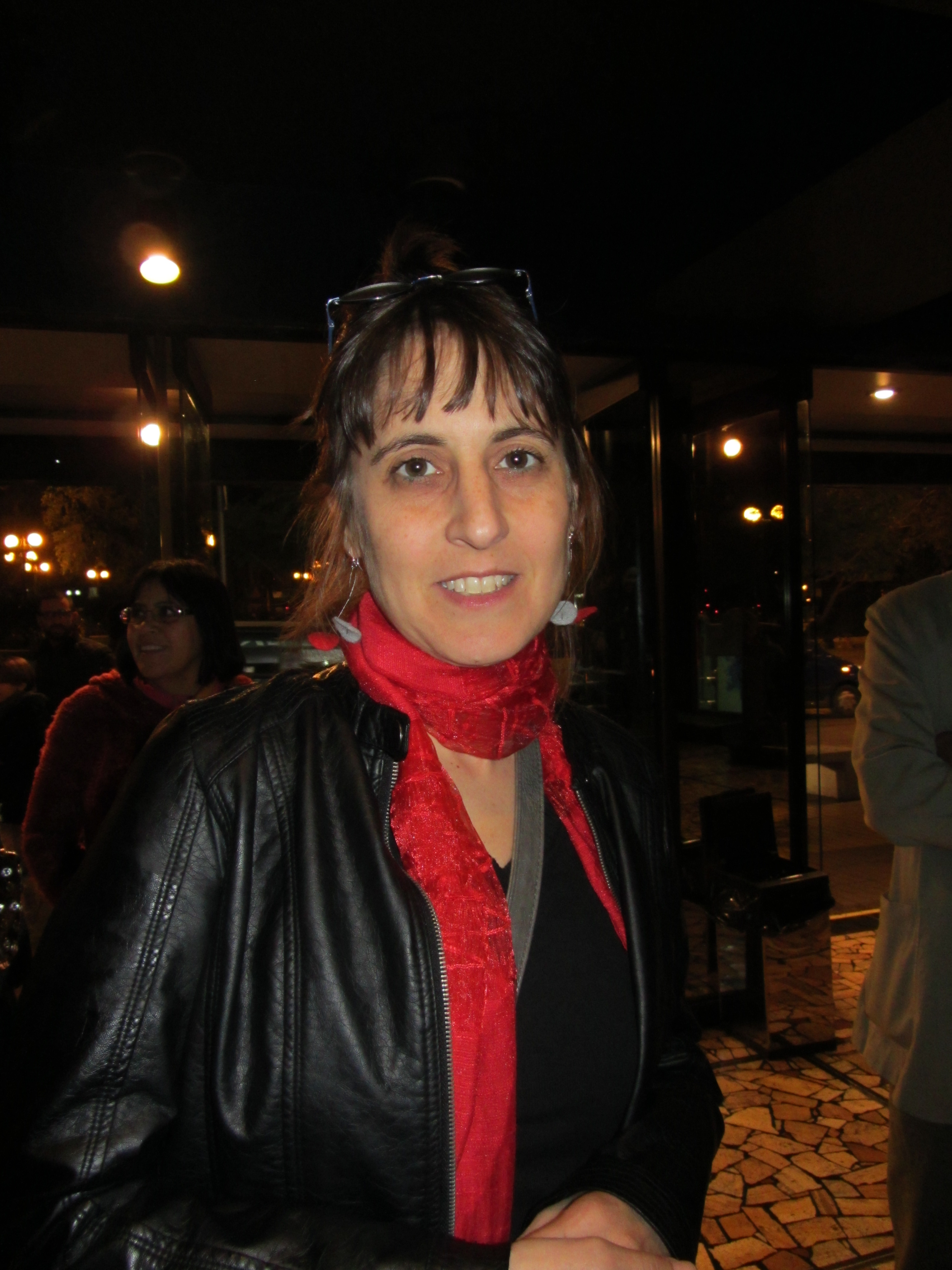 La escritora chilena Alejandra Costamagna en el vestíbulo del Teatro de la Universidad Católica, plaza Ñuñoa, a la salida de la obra La anarquista de David Mamet. Santiago, mayo de 2014